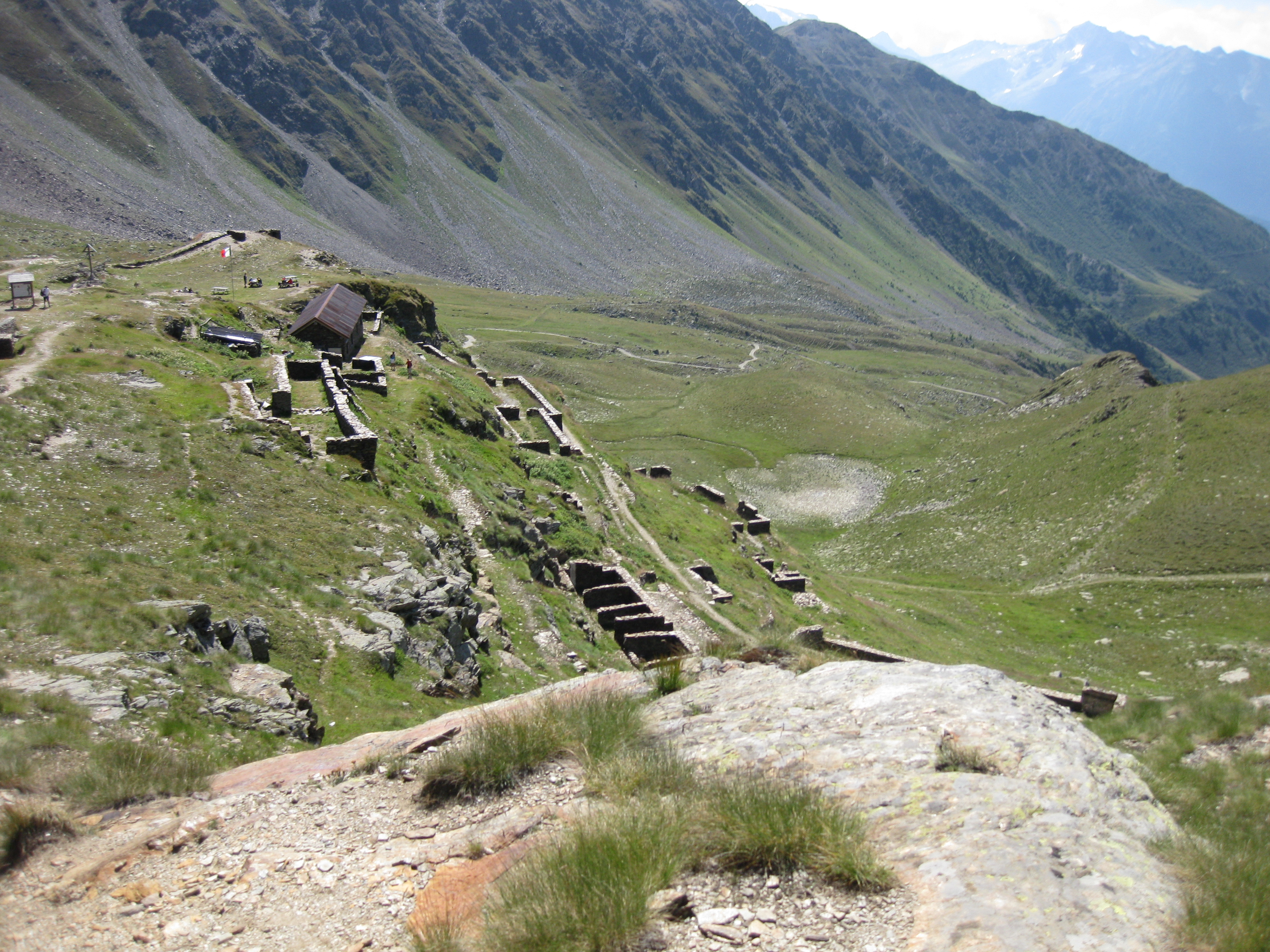 conca montozzo e i baraccamnti nei nostri tempi